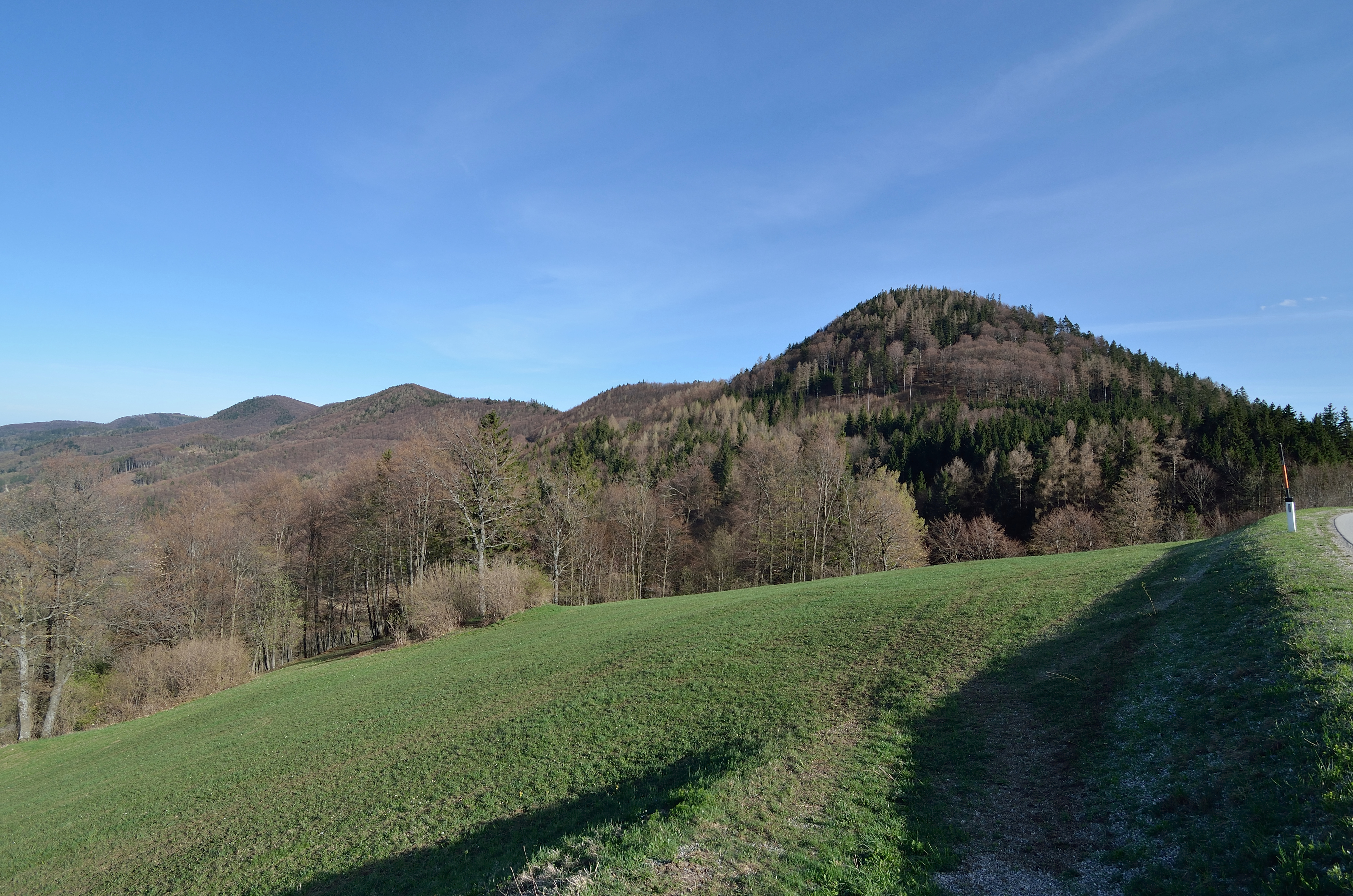 Der Asangkogel ist ein 860m hoher Berg in den Türnitzer Alpen auf dem Gemeindegebiet von Frankenfels.